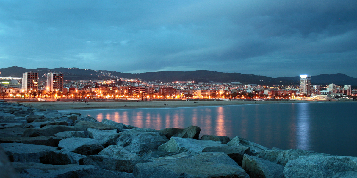 Mataró.